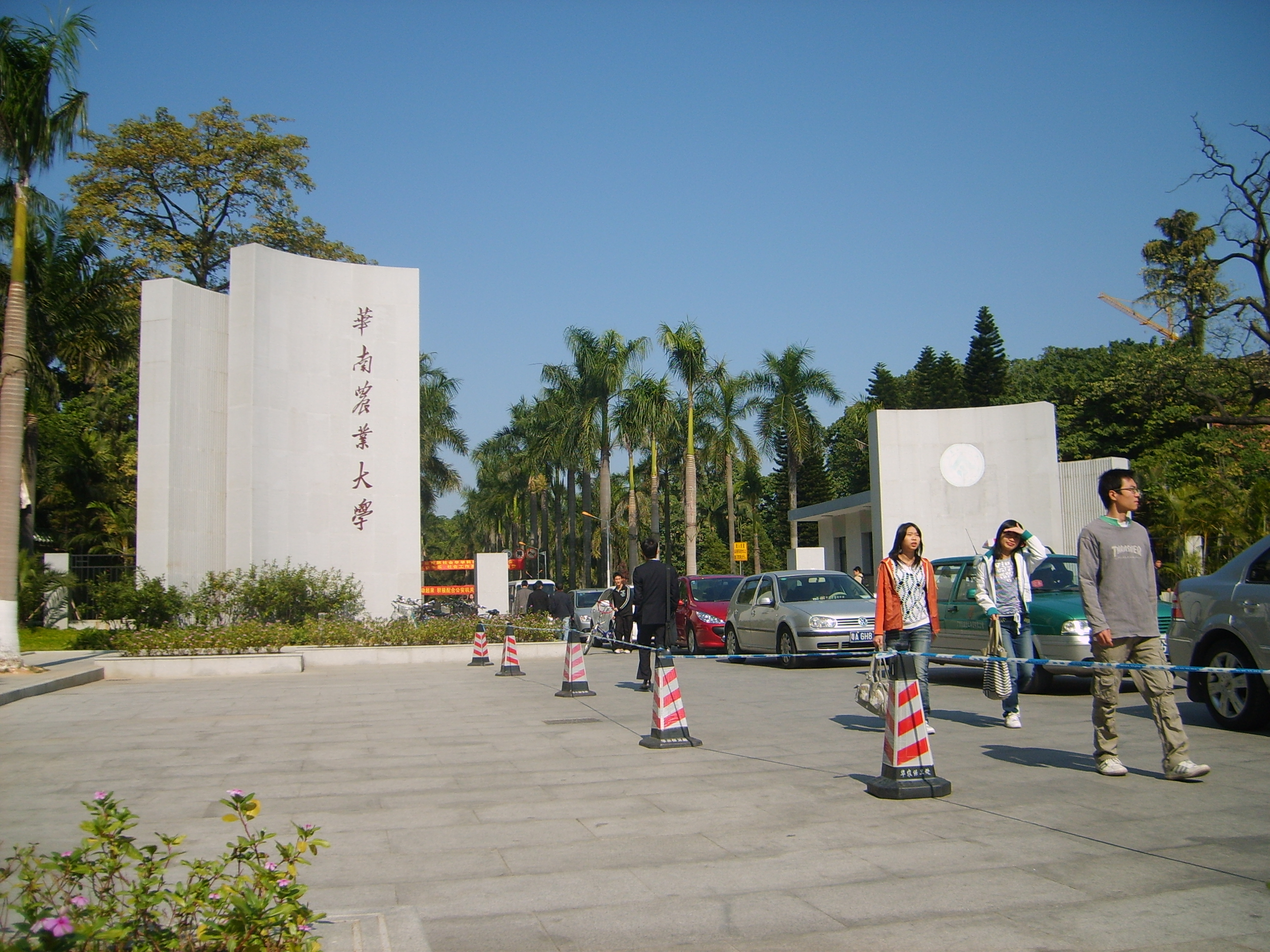 华南农业大学正门